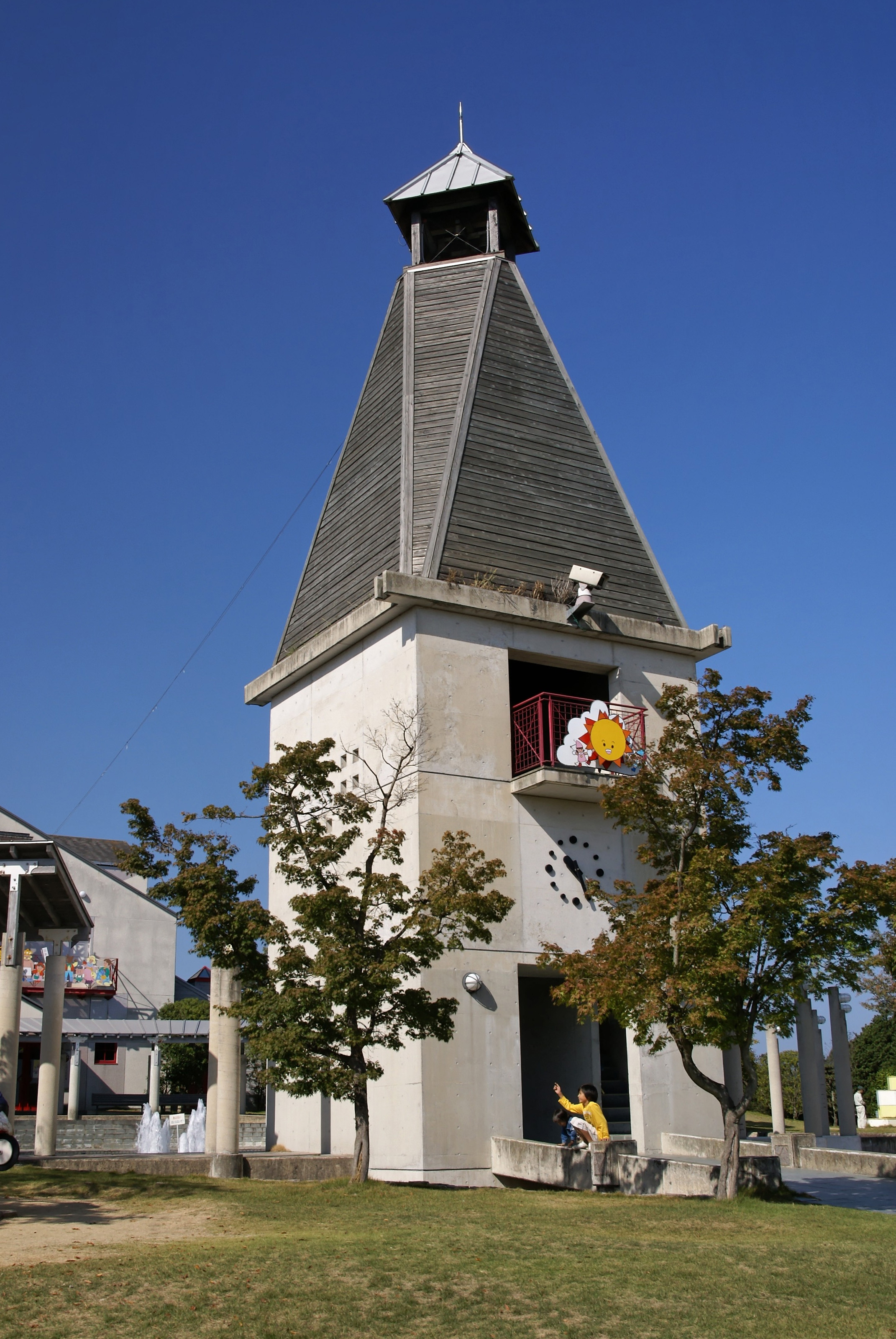 Toramaru Park in Higashikagawa, Kagawa prefecture, Japan